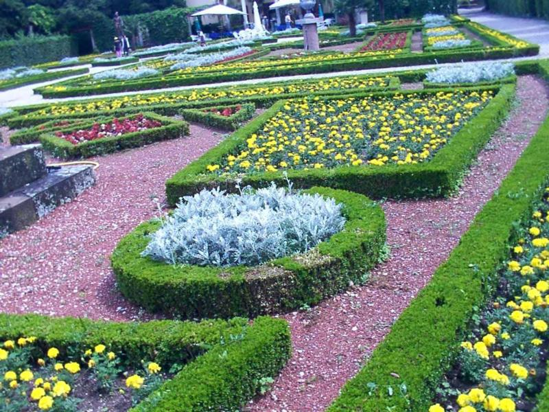 Castello di Miramare a Trieste. Il giardino reale.